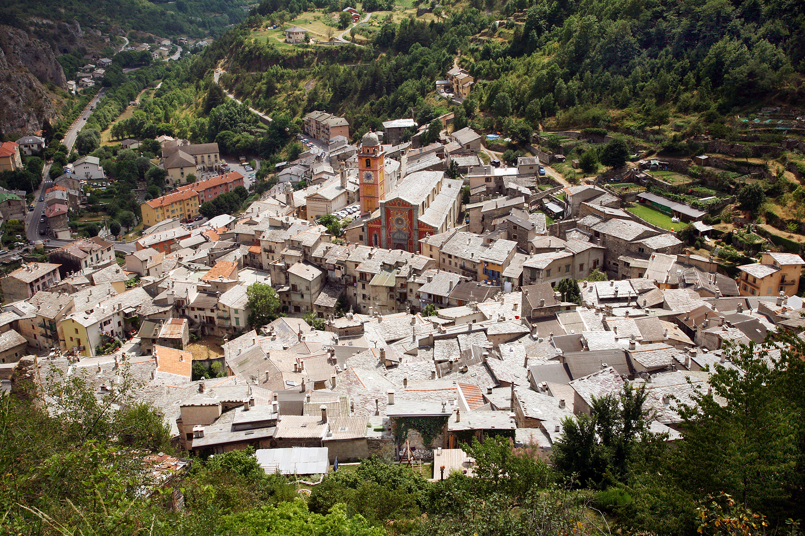 Франция. Лазурный Берег. Тенд